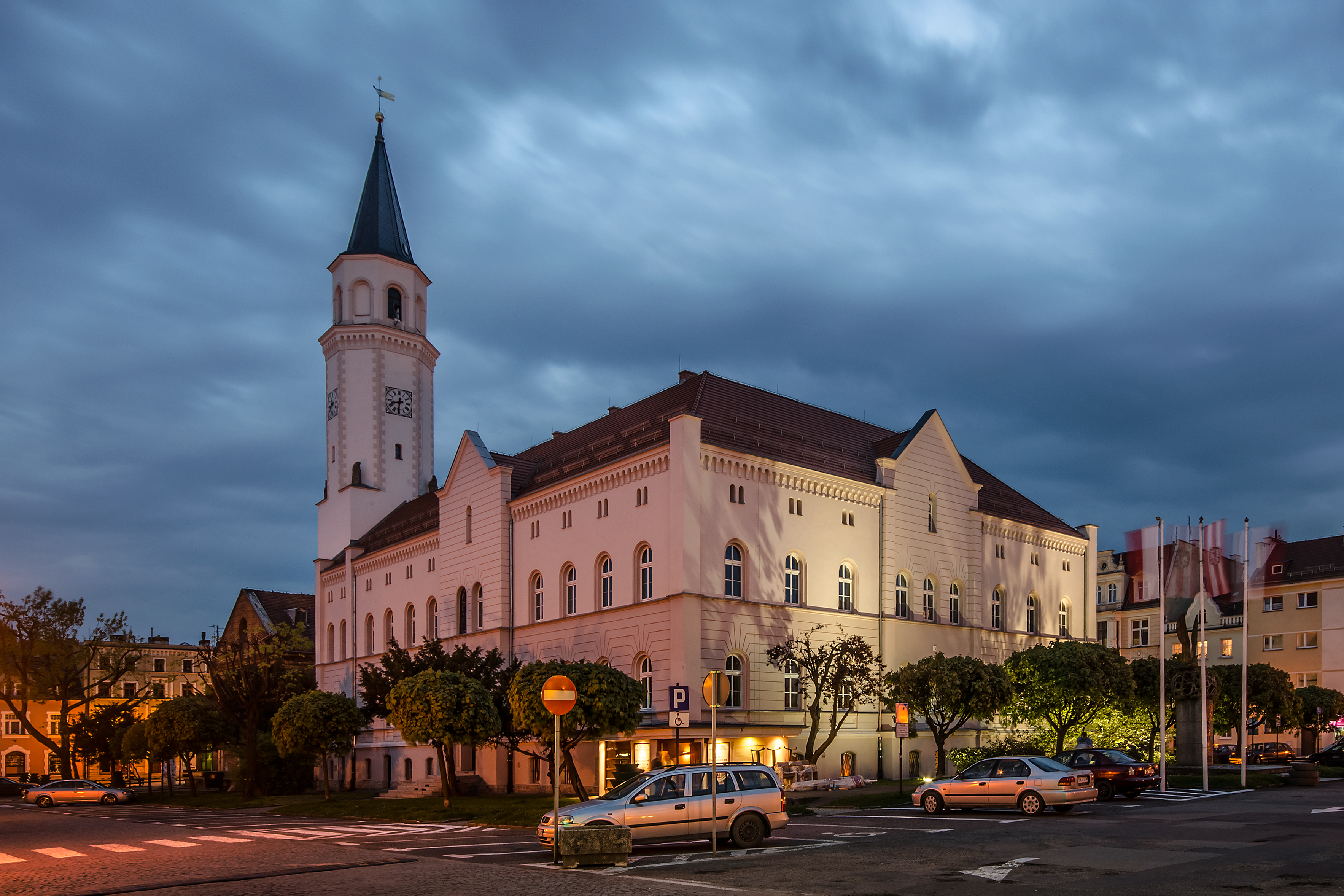 Kąty Wrocławskie, wieża ratuszowa, 1613